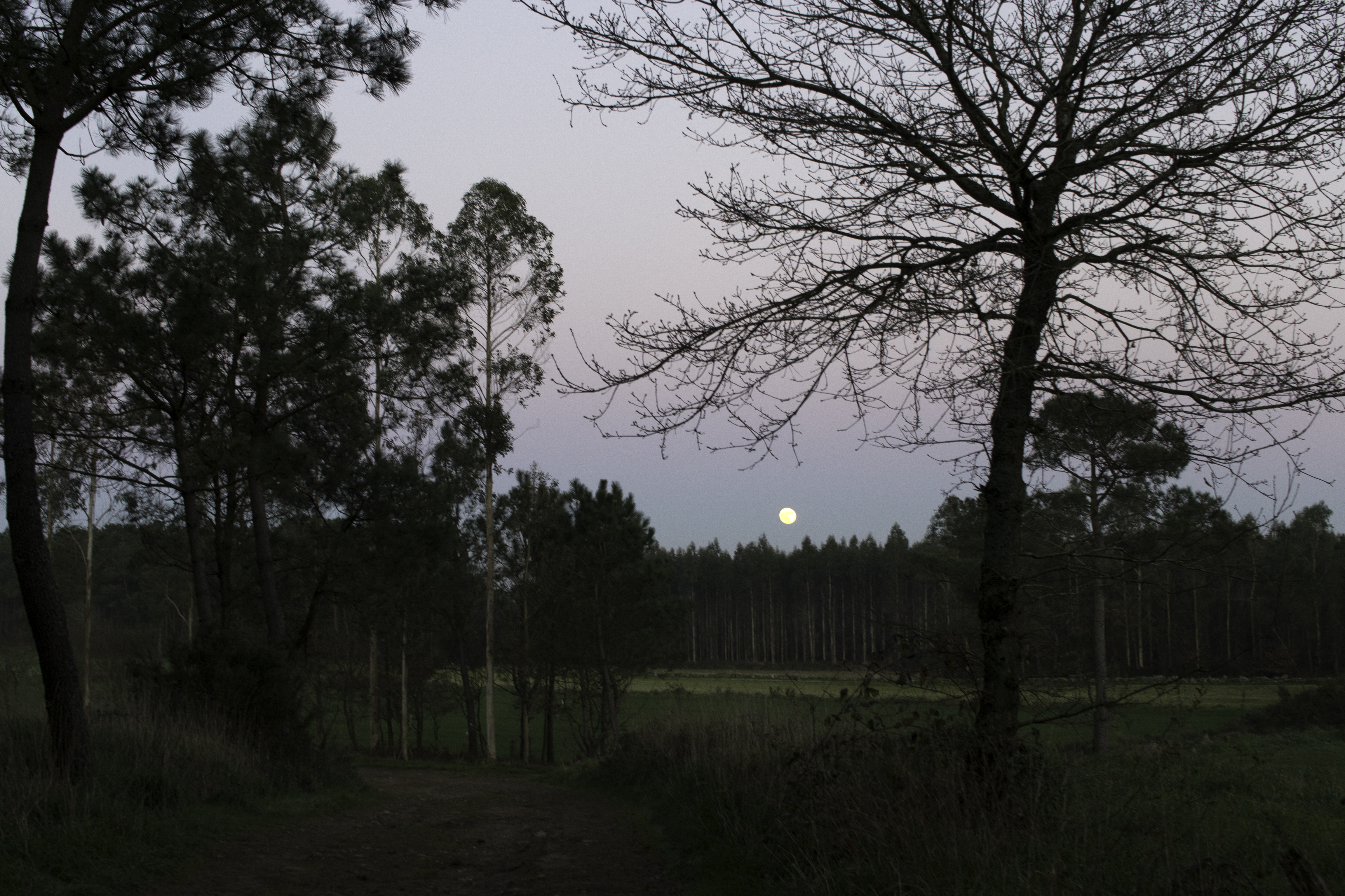 Costa da Morte, Dumbría, Regoelle This is a photography of a Special Area of Conservation in Spain with the ID: ES1110005. Natura2000 entry, EEA entry